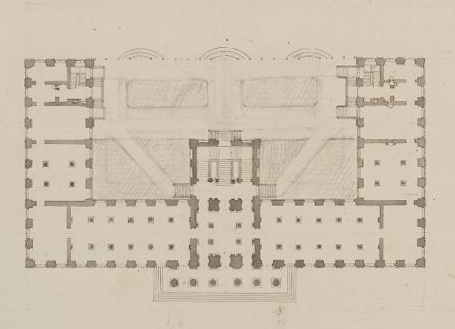 Entwurfszeichnung des Erdgeschoßes vom Museum Fridericanum in Kassel